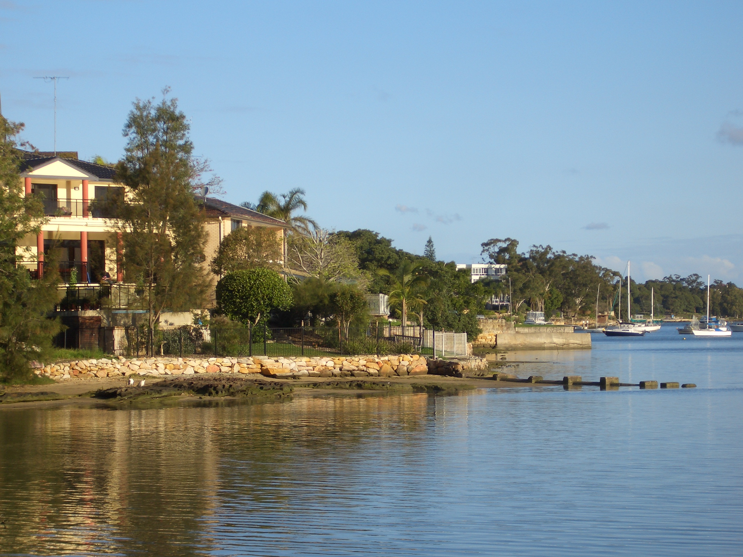 Tennyson Point